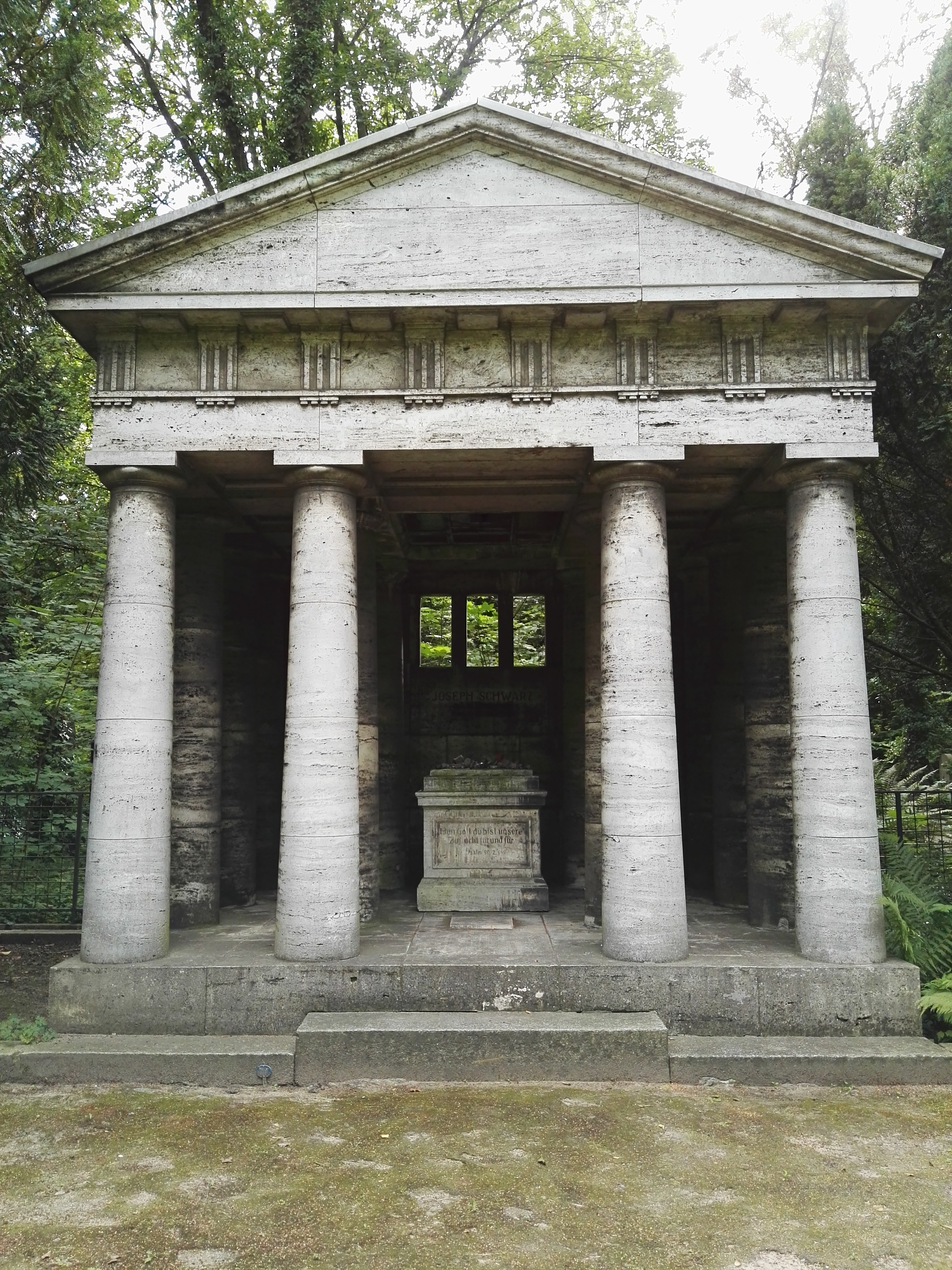 Grab von Joseph Schwartz auf dem denkmalgeschützten Jüdischen Friedhof Berlin-Weißensee